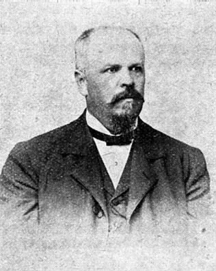 Josef Sylvestr Vaněček (1848 - 1922), Český matematik a pedagog .